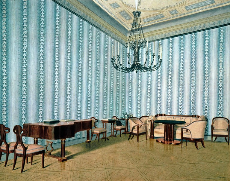 Musiksalon von Erzherzogin Sophie im Blauen Hof in Laxenburg. Gouache, Stiftung Preußische Schlösser und Gärten Berlin-Brandenburg